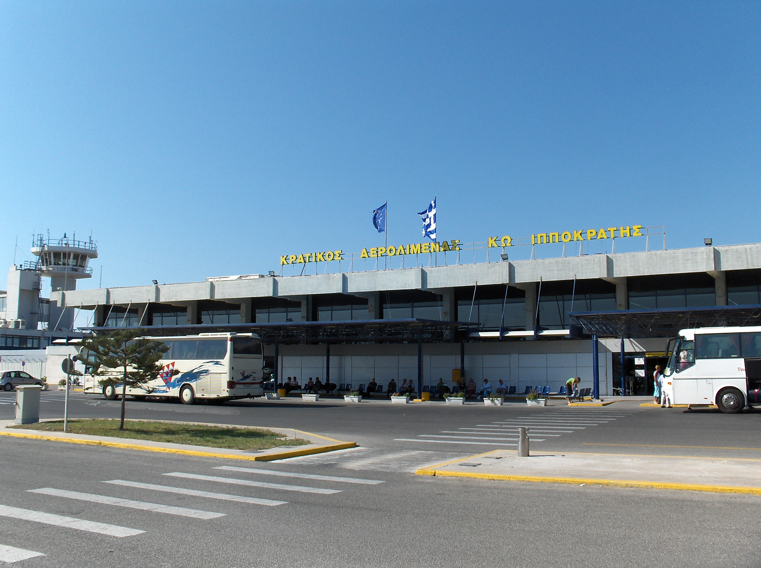 Kos Airport